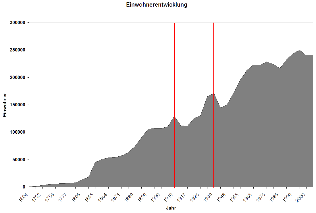 Diagramm der Bevölkerungsentwickling von Krefeld